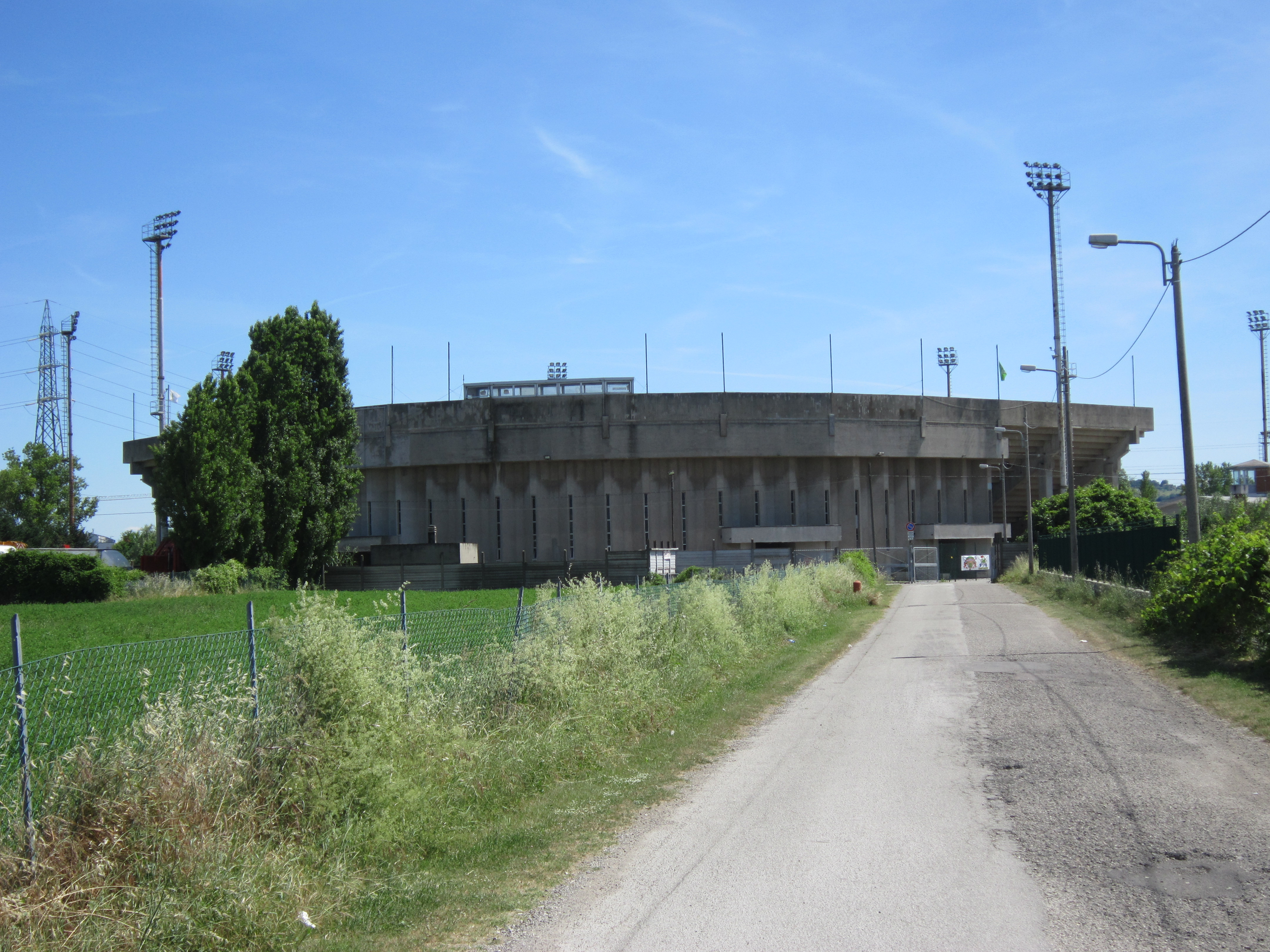 L'esterno dello stadio in cui gioca il Rimini Baseball, i cui componenti sono ribattezzati "Pirati".